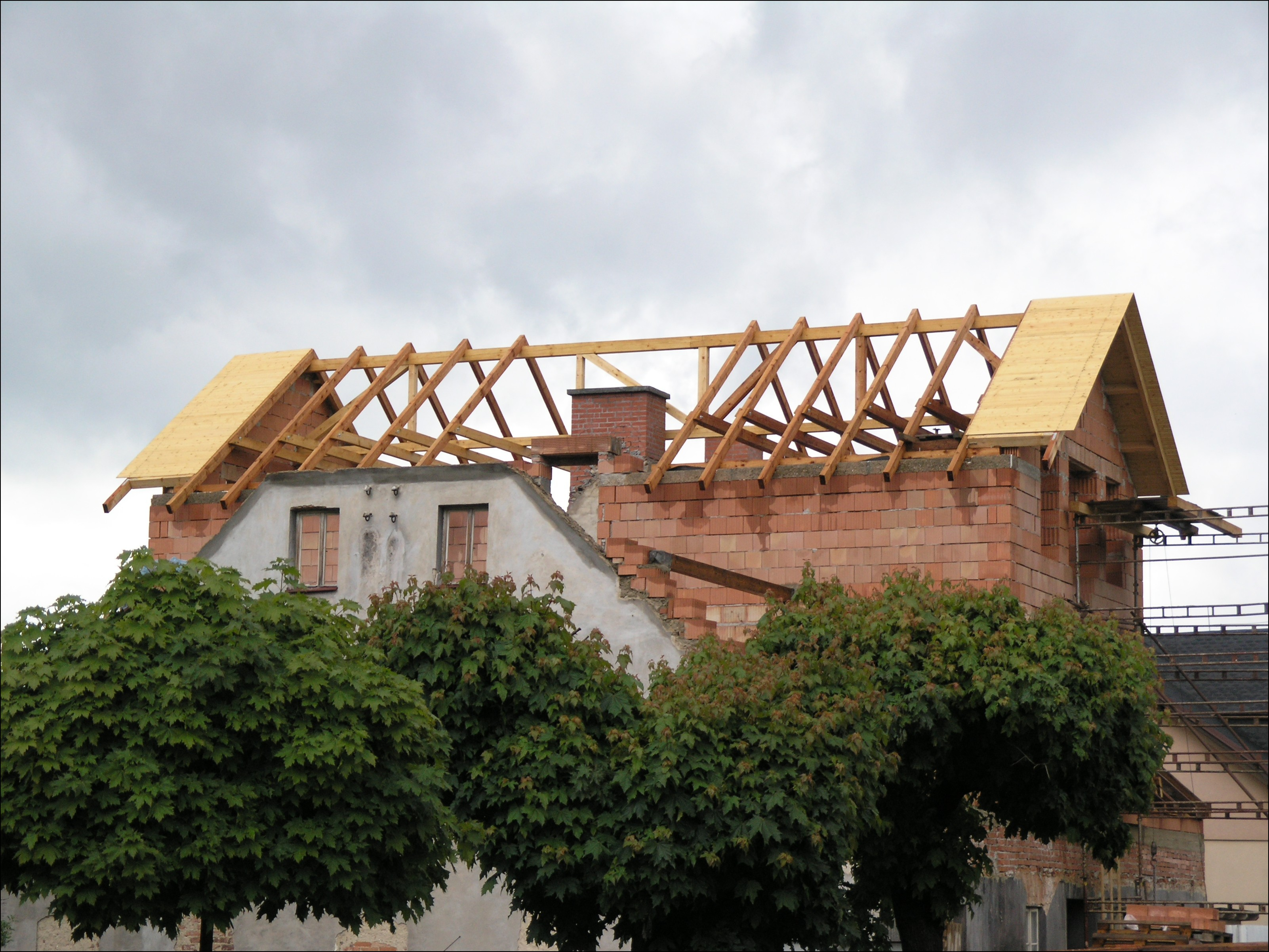 Hejnice - stavba nové střechy